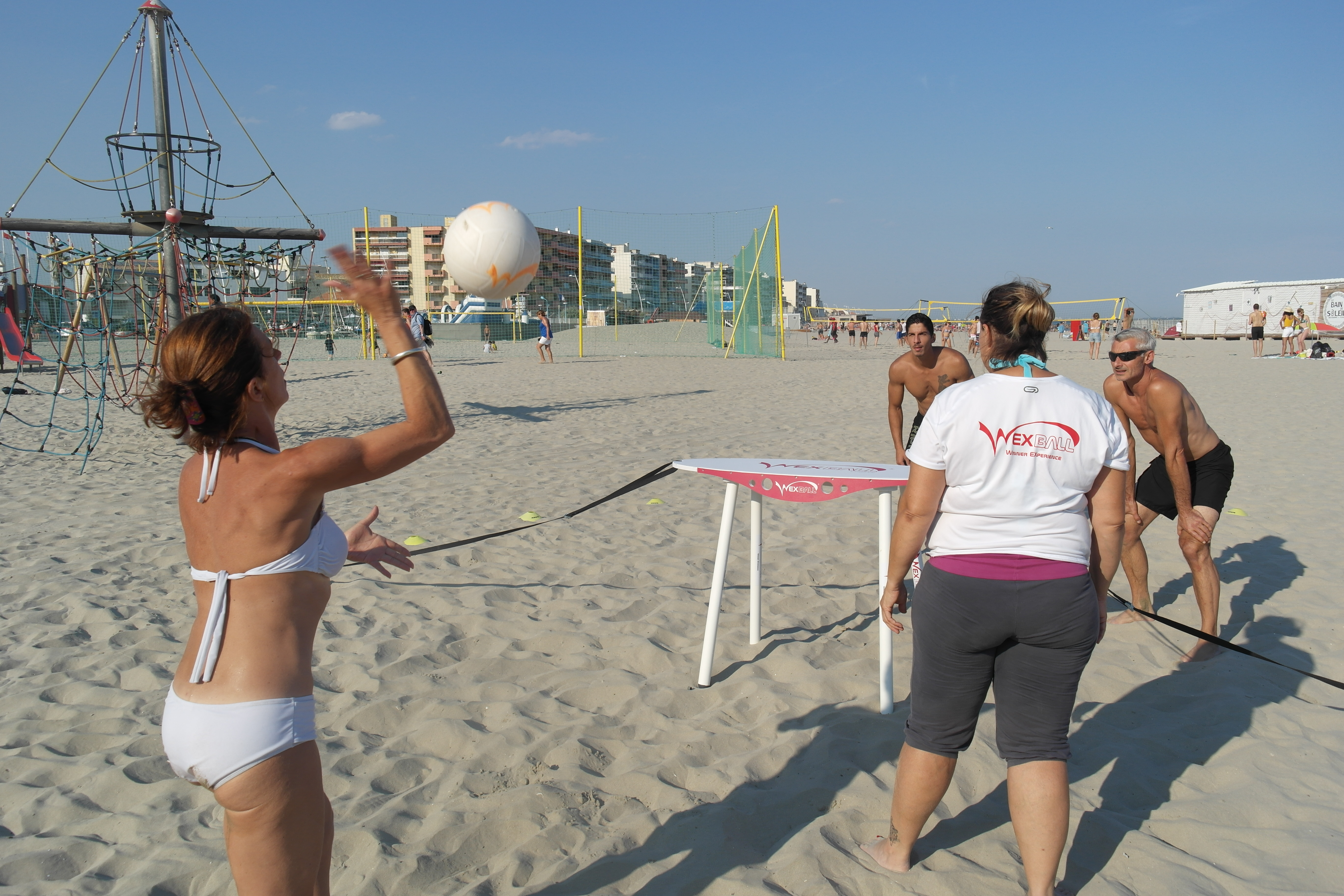 Partie de wexball autour d'une planche et d'un ballon sur une plage de sable en Occitanie, Juillet 2018